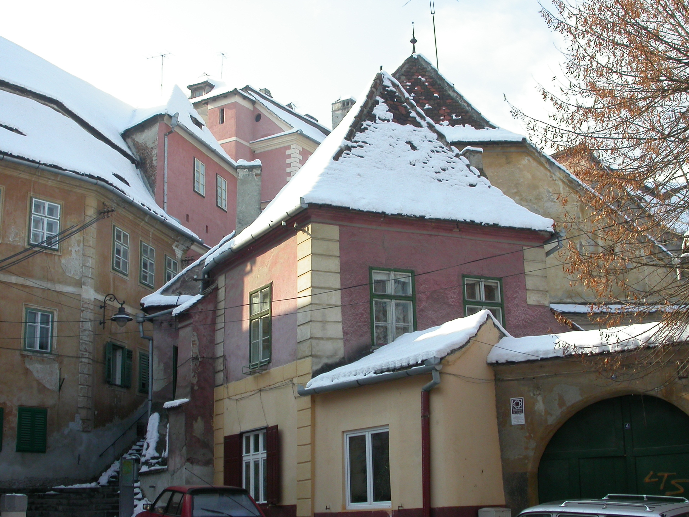 Casă (înglobează fragmente de curtine din incinta III), sec. XVIII